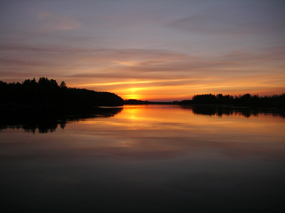 Sunset at Kobuk River, Alaska